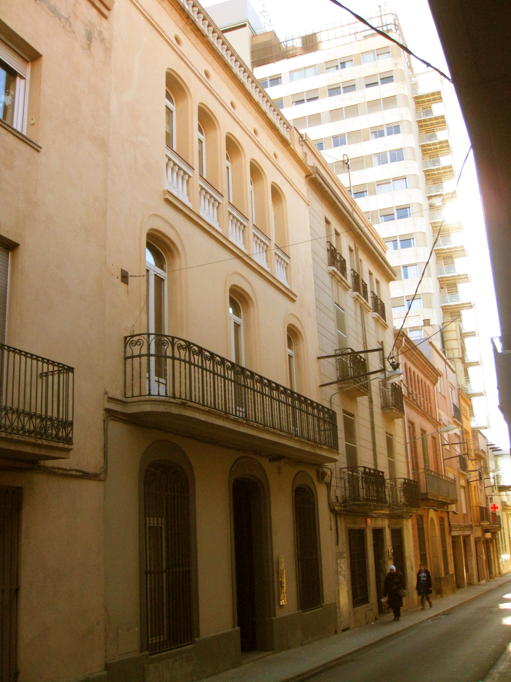 Casa Lluís Salvans, obra de Lluís Muncunill de 1915, al carrer de Sant Antoni núm. 32 (Terrassa). Al fons, l'edifici de la Mútua de Terrassa.